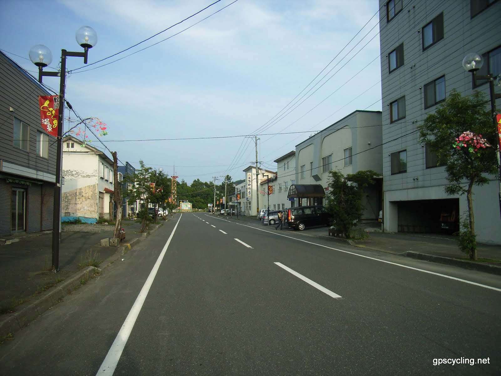 豊富温泉 温泉街